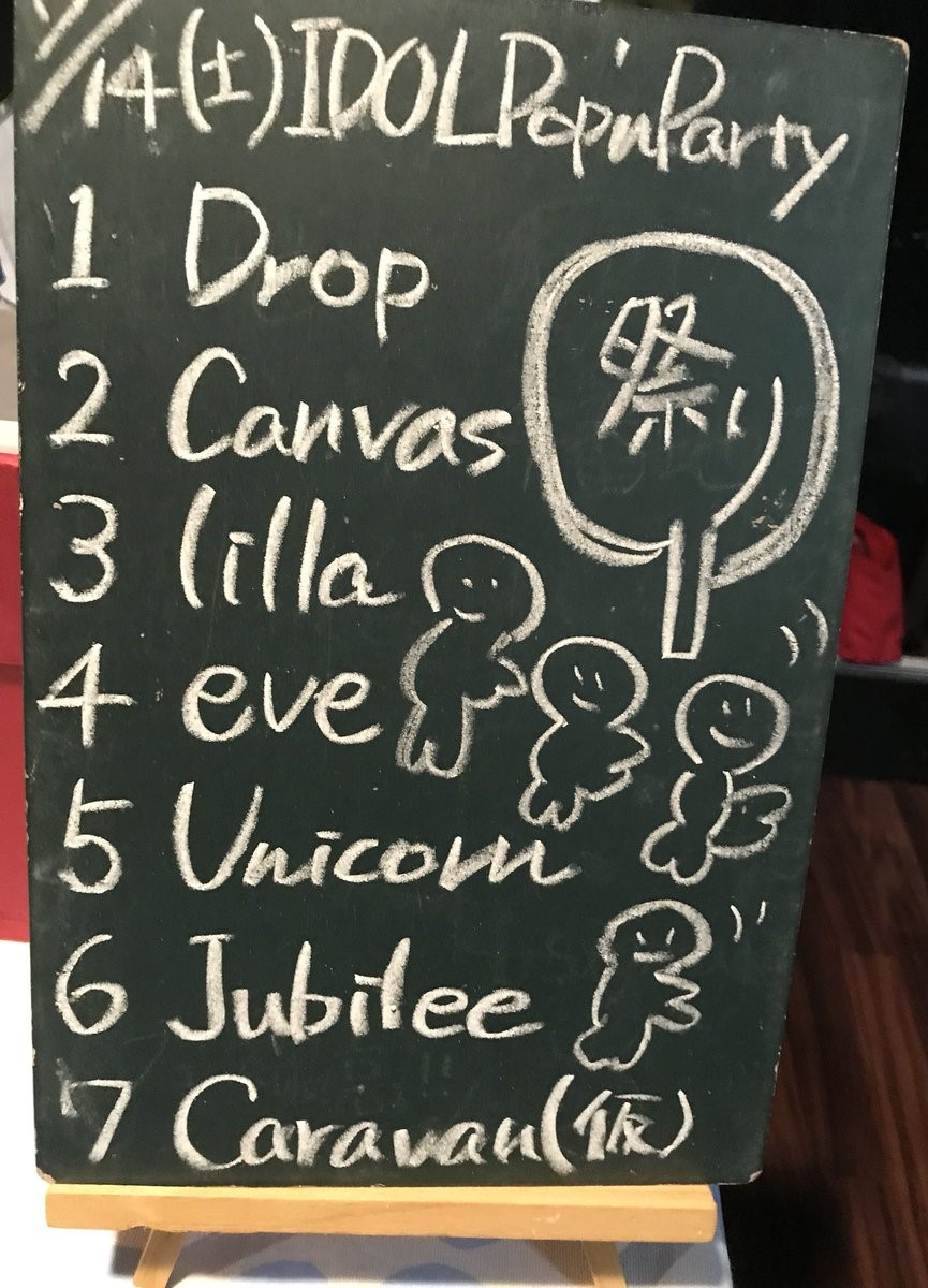 amiinAセトリボード(20180714(1))